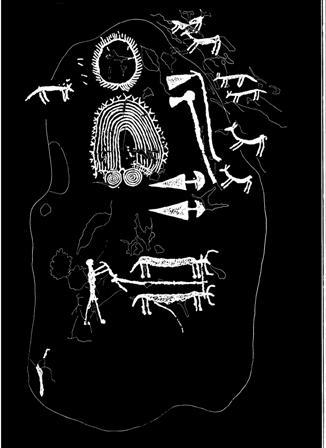 stèle de Bagnolo1